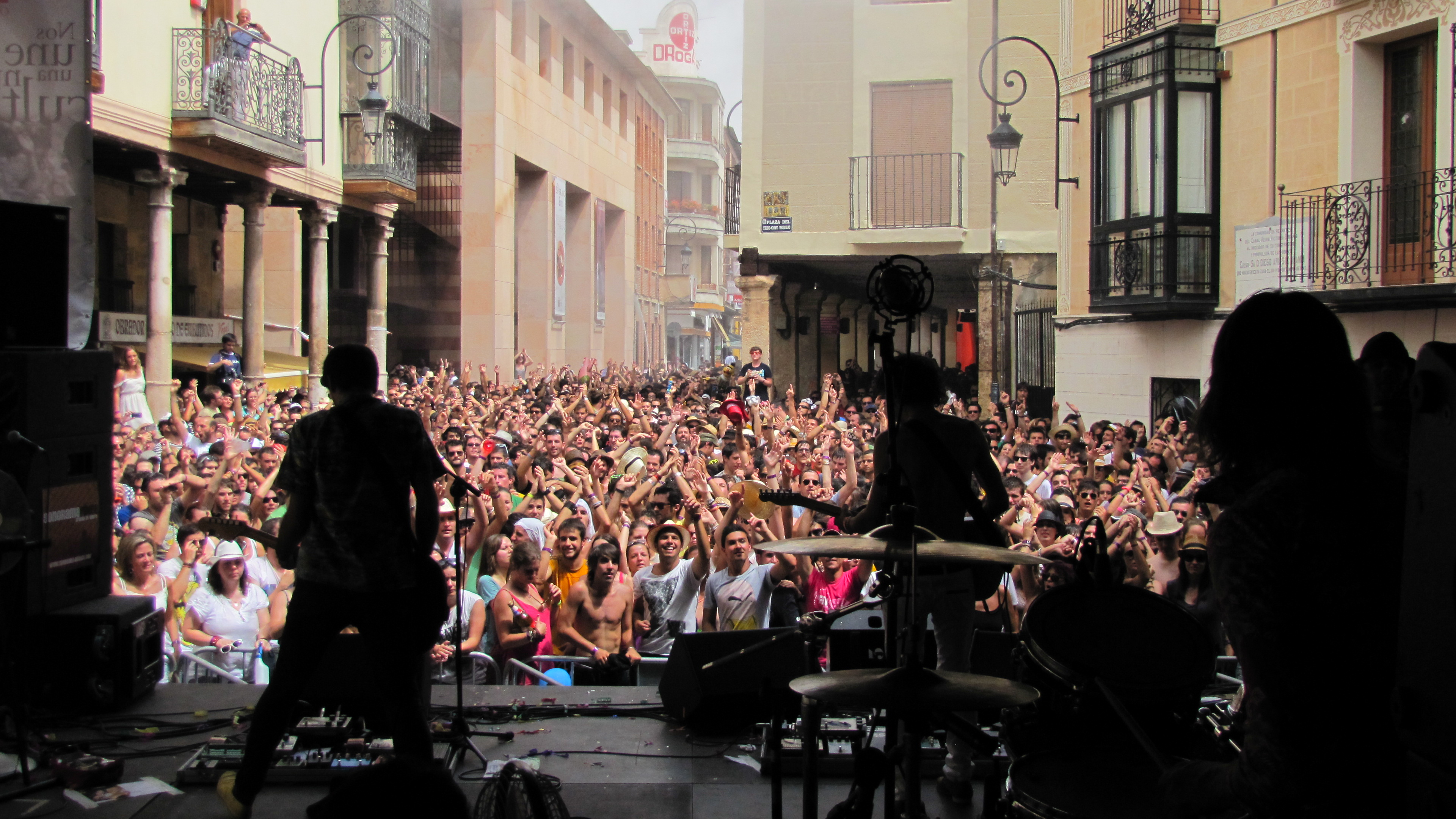 Concierto de Sidonie durante el Festival Sonorama Ribera 2012